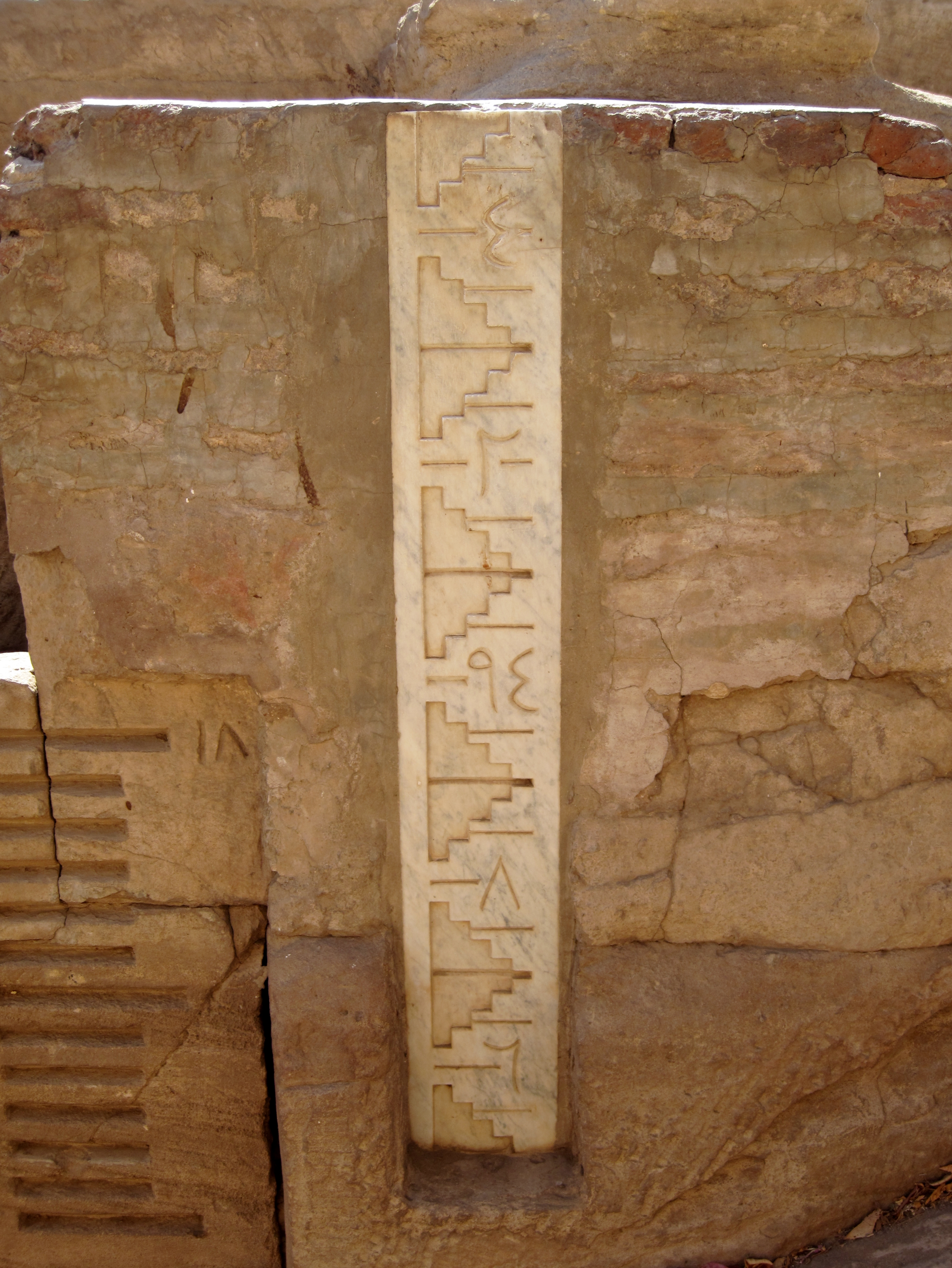 Nilometer an der Südostseite der Insel Elephantine in Assuan, Ägypten